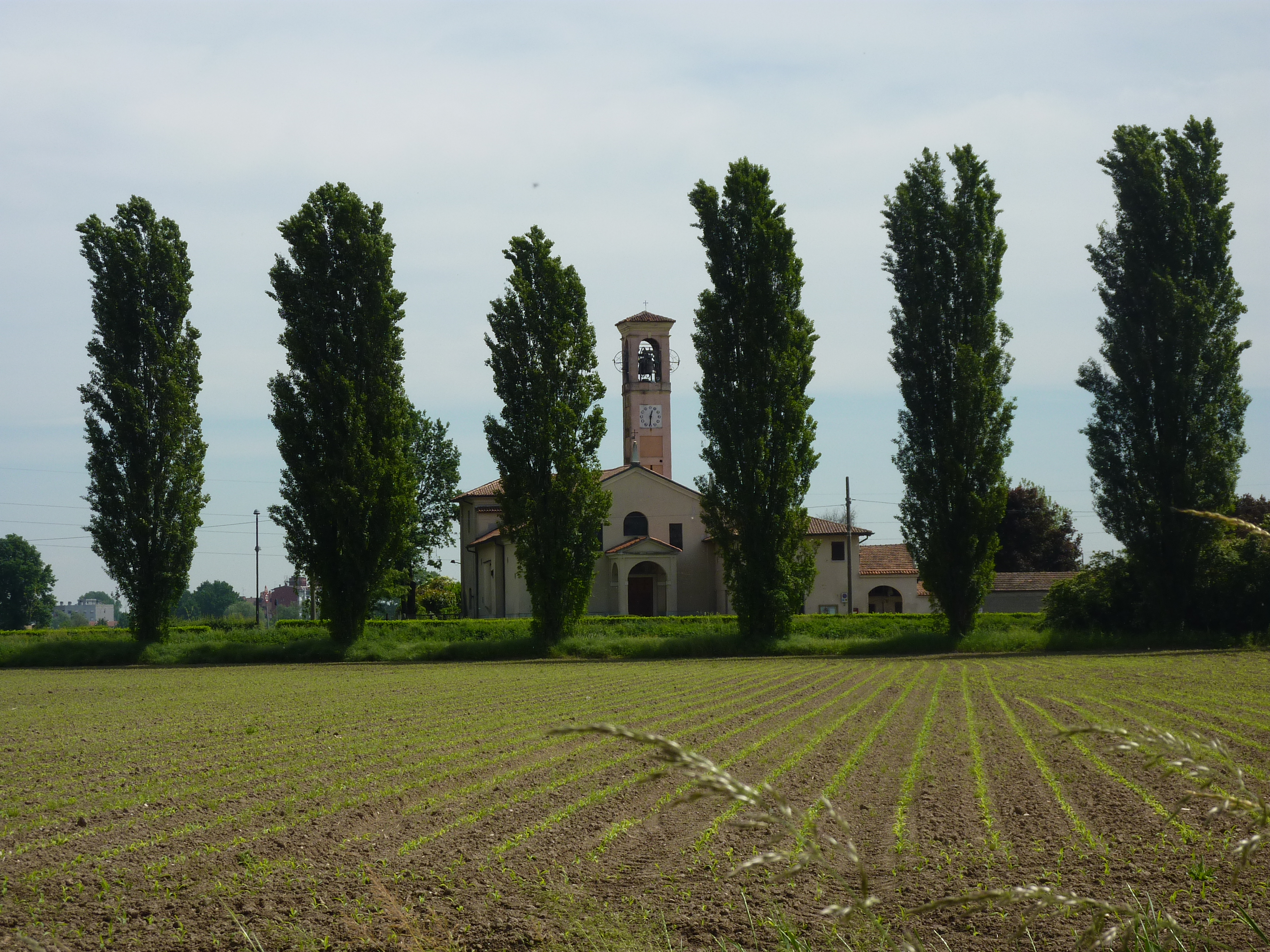 chiesa di san martino olearo